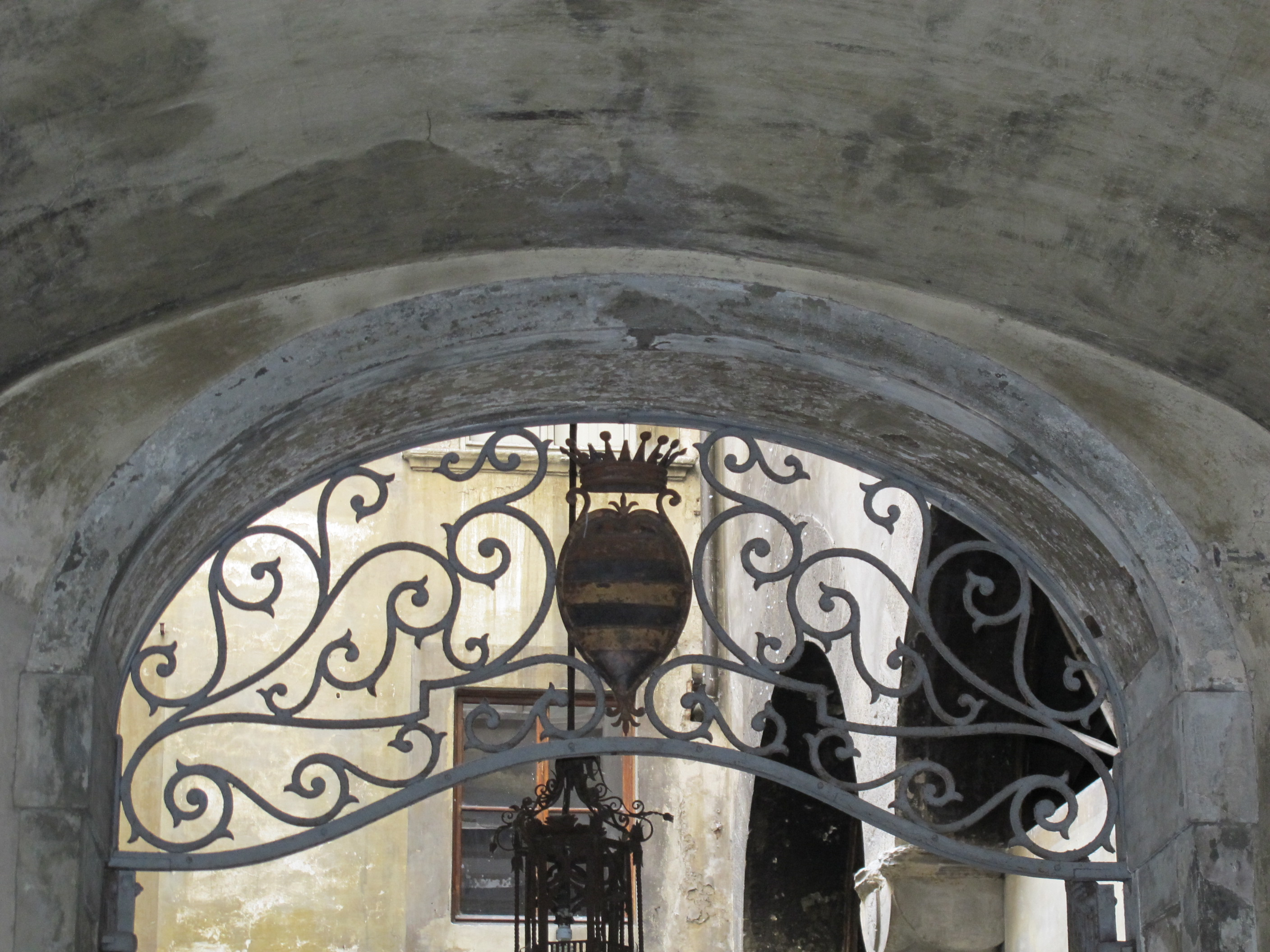 Palazzo mancini, stemma androne ferro battuto